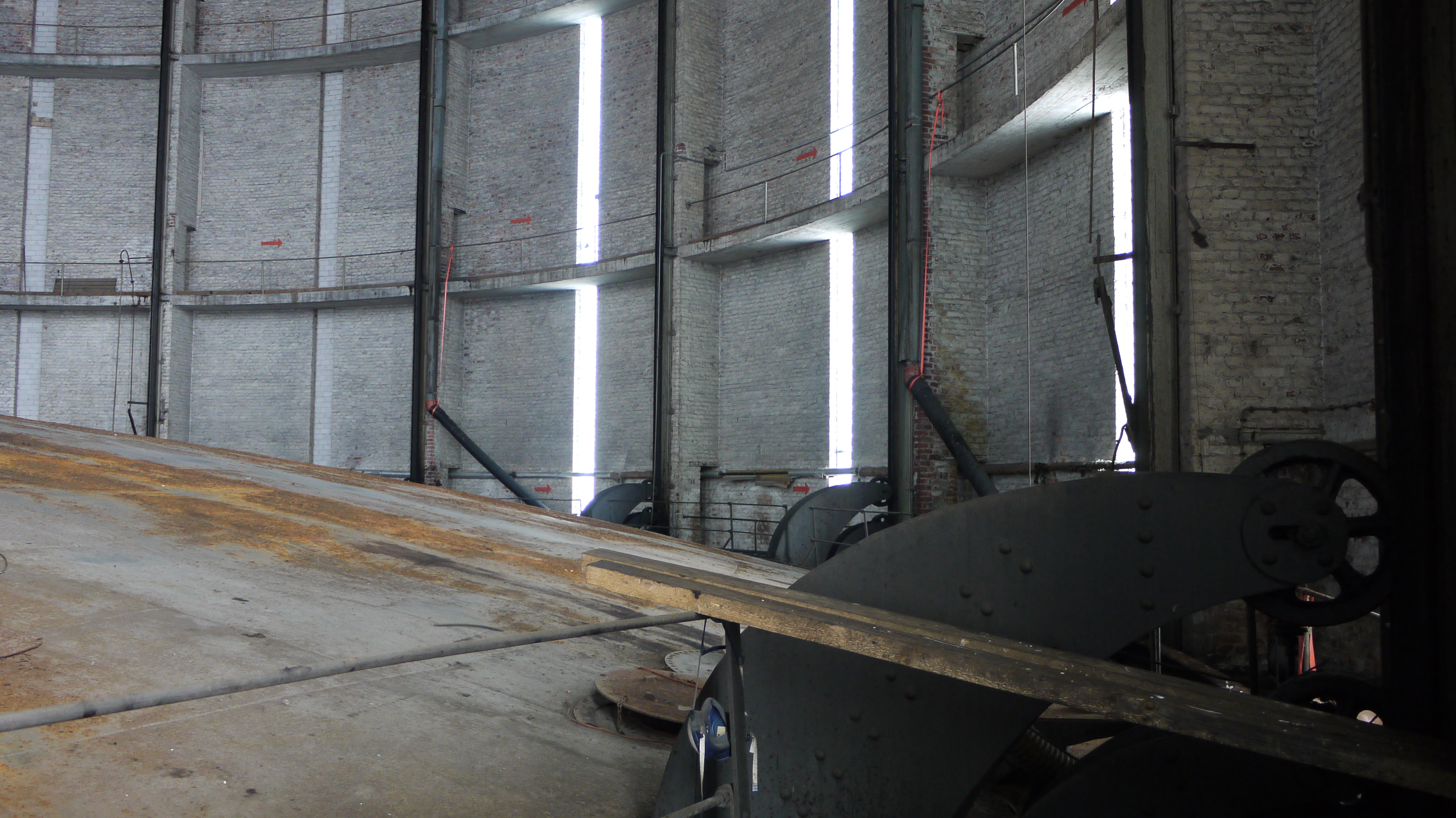 Suvilahden kaasukellon sisätila alhaalla olevan säiliön päältä kuvattuna.